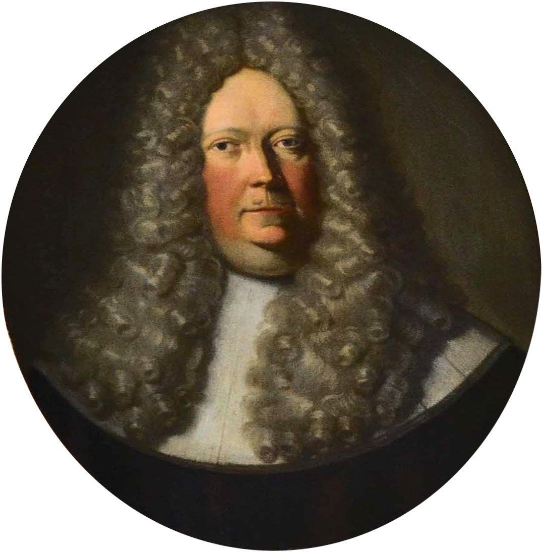 Sebastian Gercken (* 15. Juni 1656 in Magdeburg; † 8. Februar 1710 in Lübeck), Lübecker Bürgermeister. Gemälde seines Epitaphs.